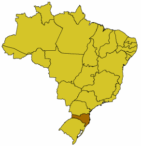 Karte Brasiliens, Santa Catarina hervorgehoben, GFDL nach der Vorlage Bild:Brasilien Bundesstaaten.png